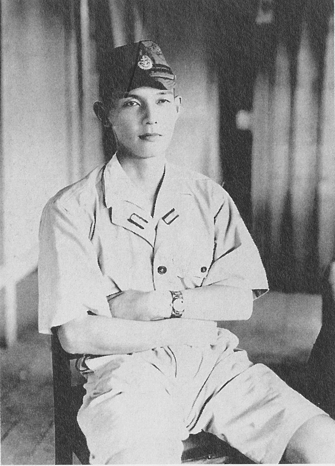 門司親徳主計少佐。1945年、台湾にて